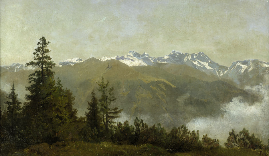 Carl Roux: Landschaft im Hochgebirge. Öl auf Leinwand. 44 x 73,5 cm. Rechts unten signiert "CRoux".